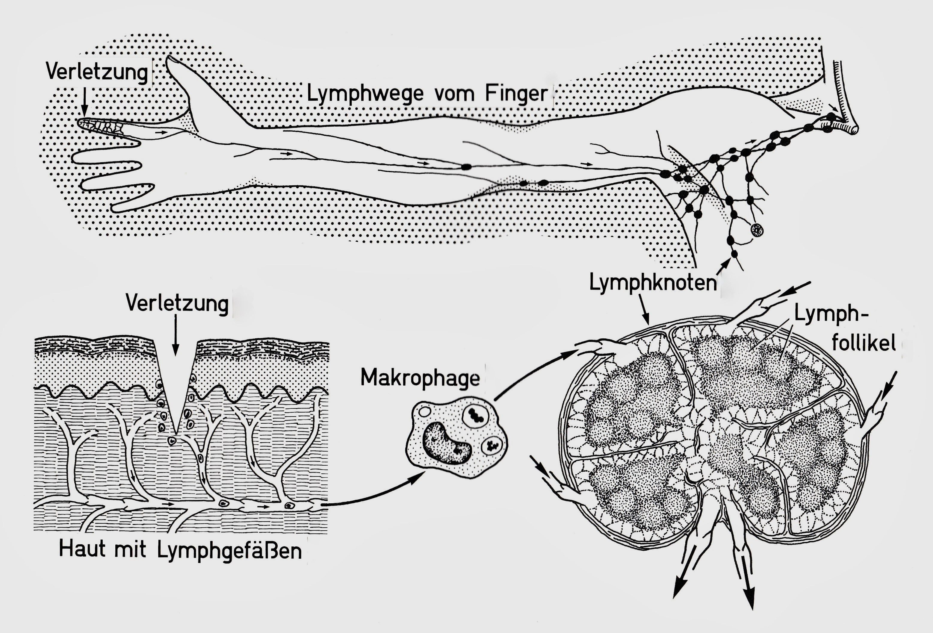 Die Funktion der Lymphgefäße bei einer infizierten Verletzung